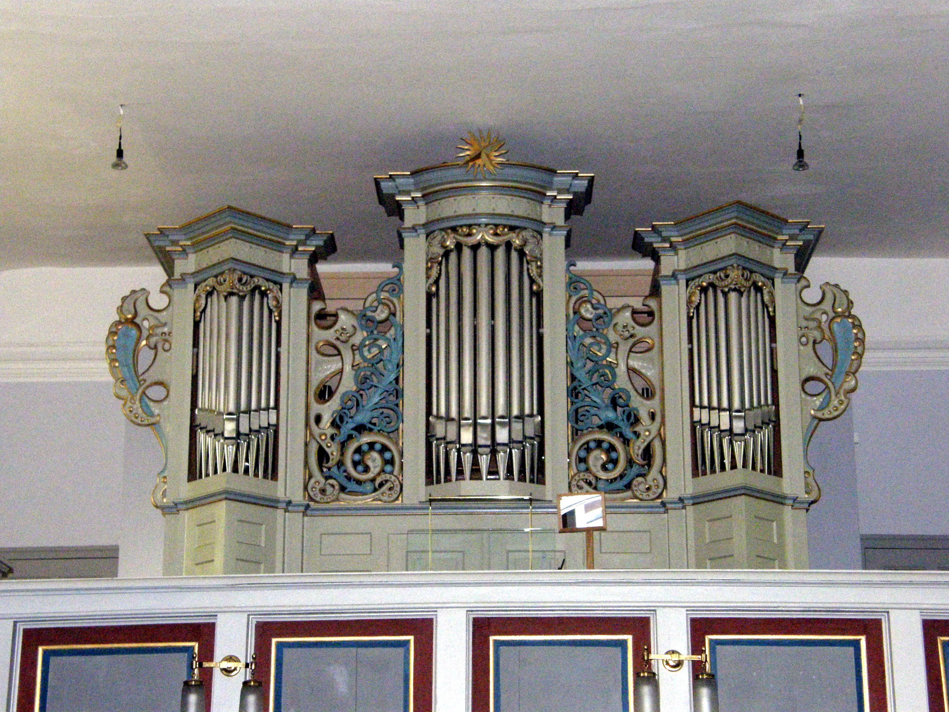 Berlin-Kaulsdorf, Jesuskirche: Sandtner-Orgel